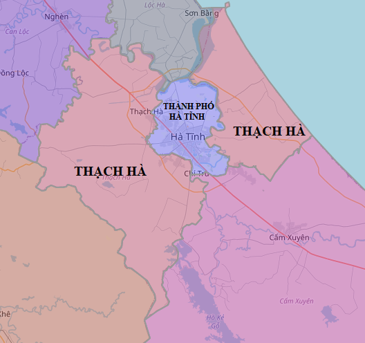 HUYỆN THẠCH HÀ, HÀ TĨNH